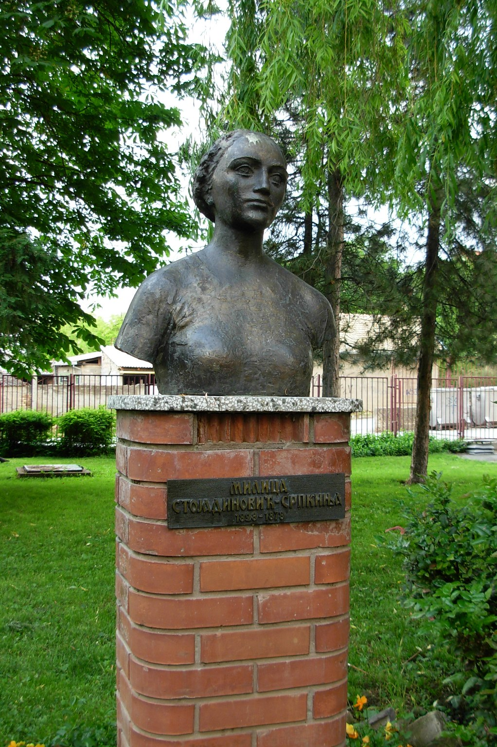 Биста Милице Стојадиновић Српкиње у Буковцу.